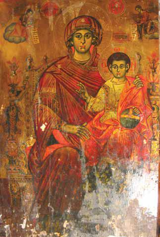 Икона во Црквата “Св. Богородица” во село Ботун, Охридско